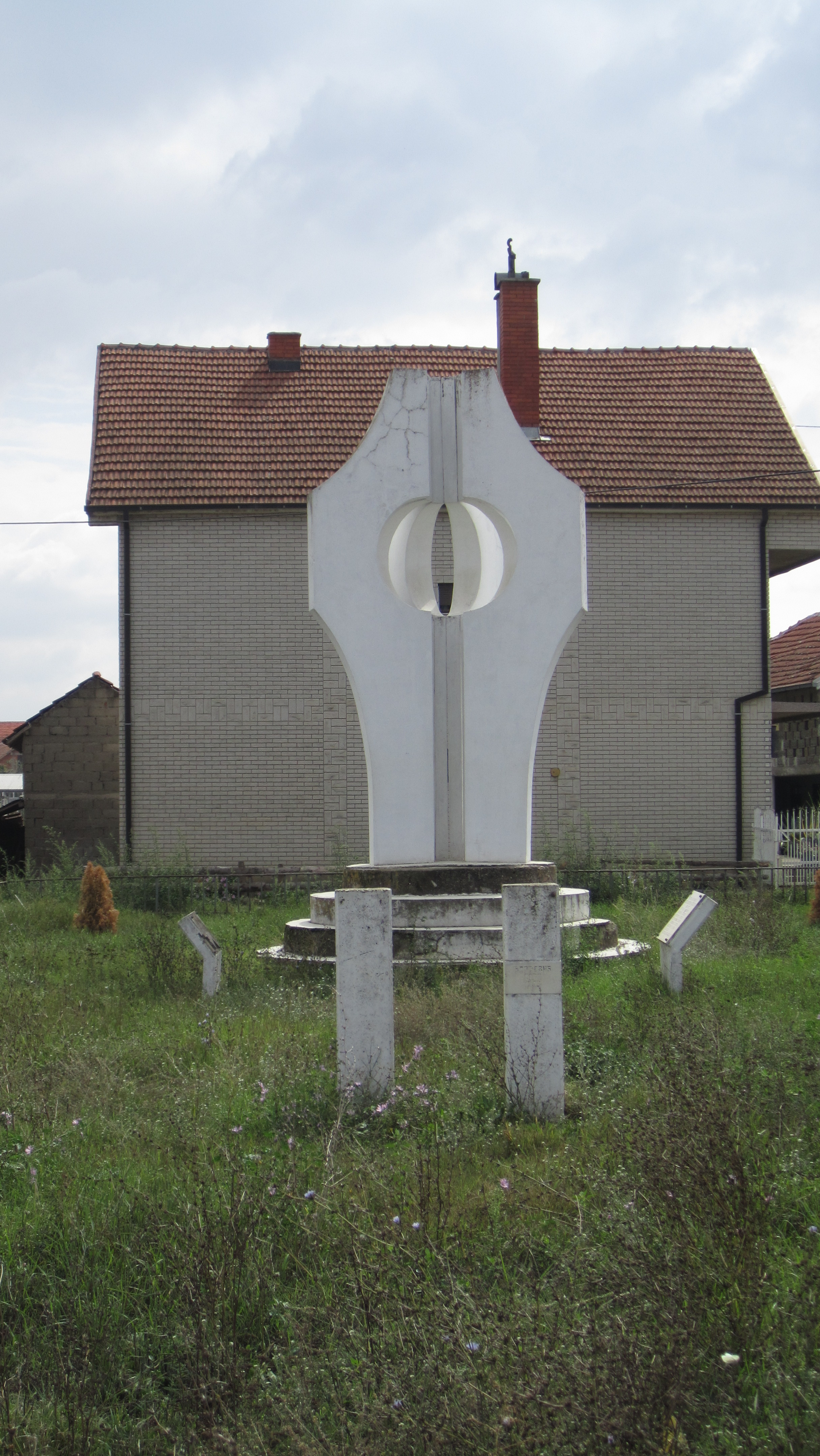 Srpski (latinica): Bobište, Leskovac